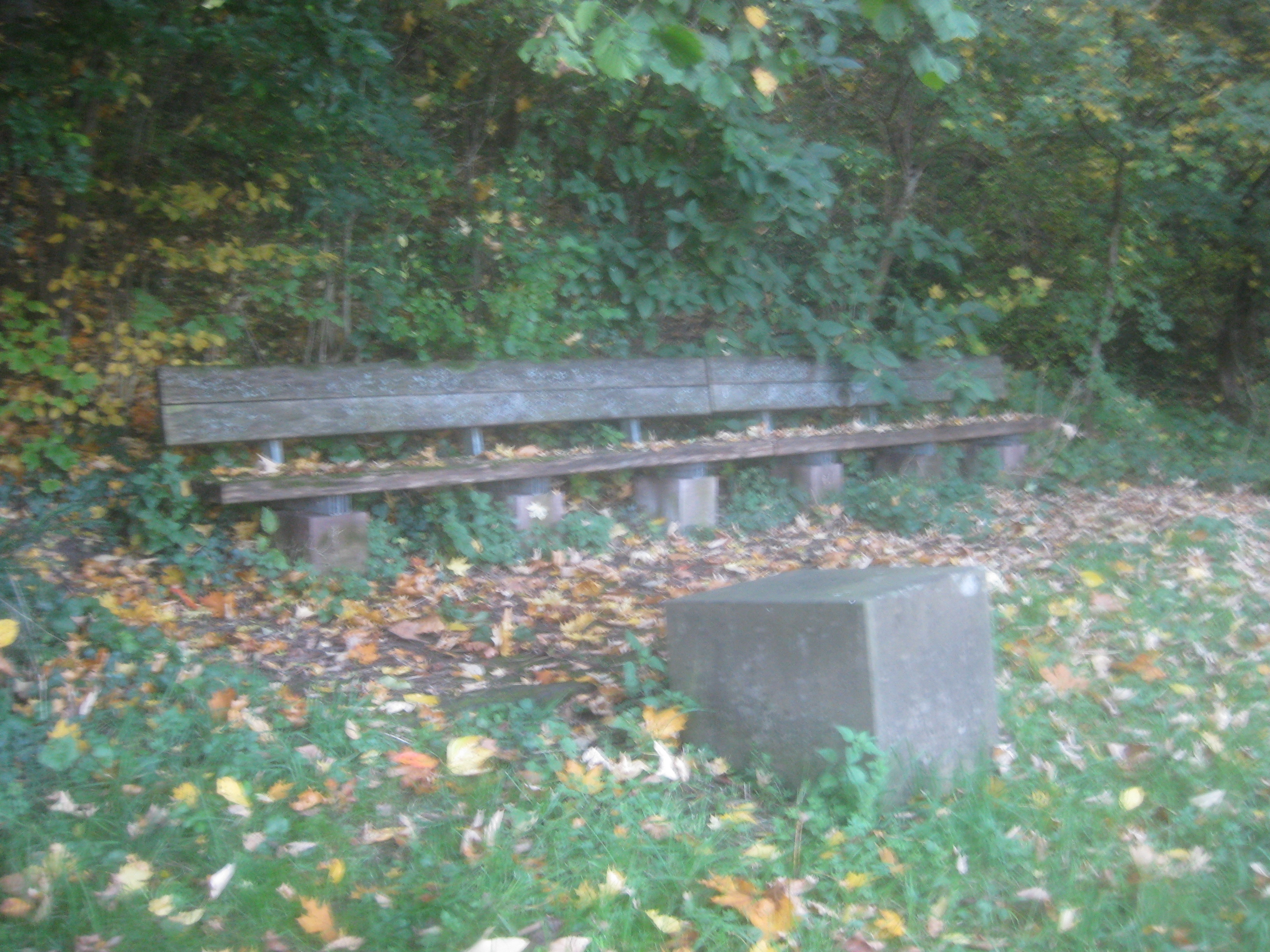 Sitzbank und Lyrikstation mit einem Gedicht („Ihr machat d Auga“) von Peter Schlack, östlich der Kunststation Im Keuper von Hans Dieter Bohnet auf dem Wartberggelände in Stuttgart.